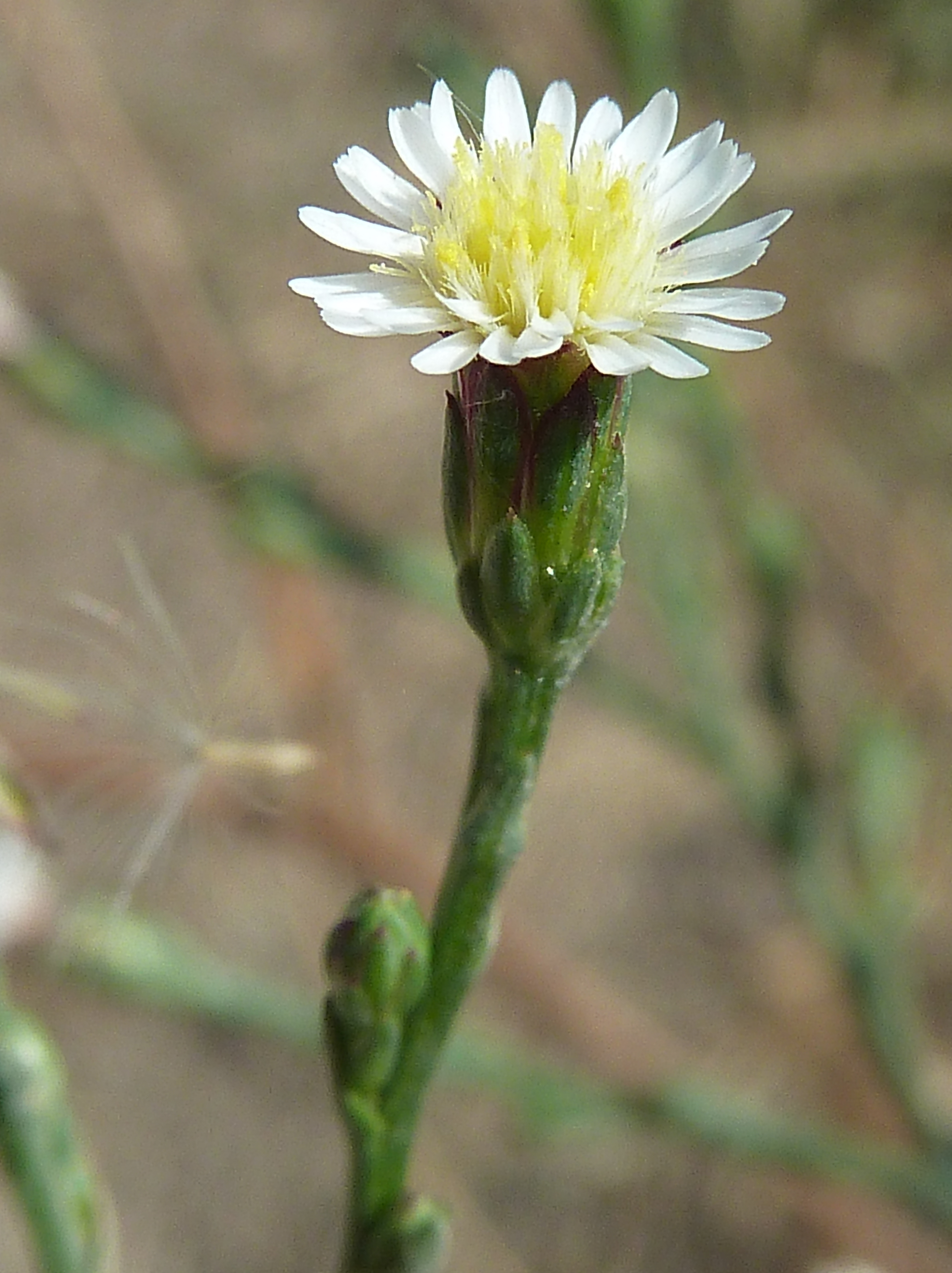 Aster squamatus (Matacavero, Pirulero) : Capítulo en floración - La Parra Alta, Albatera (Alicante, España).